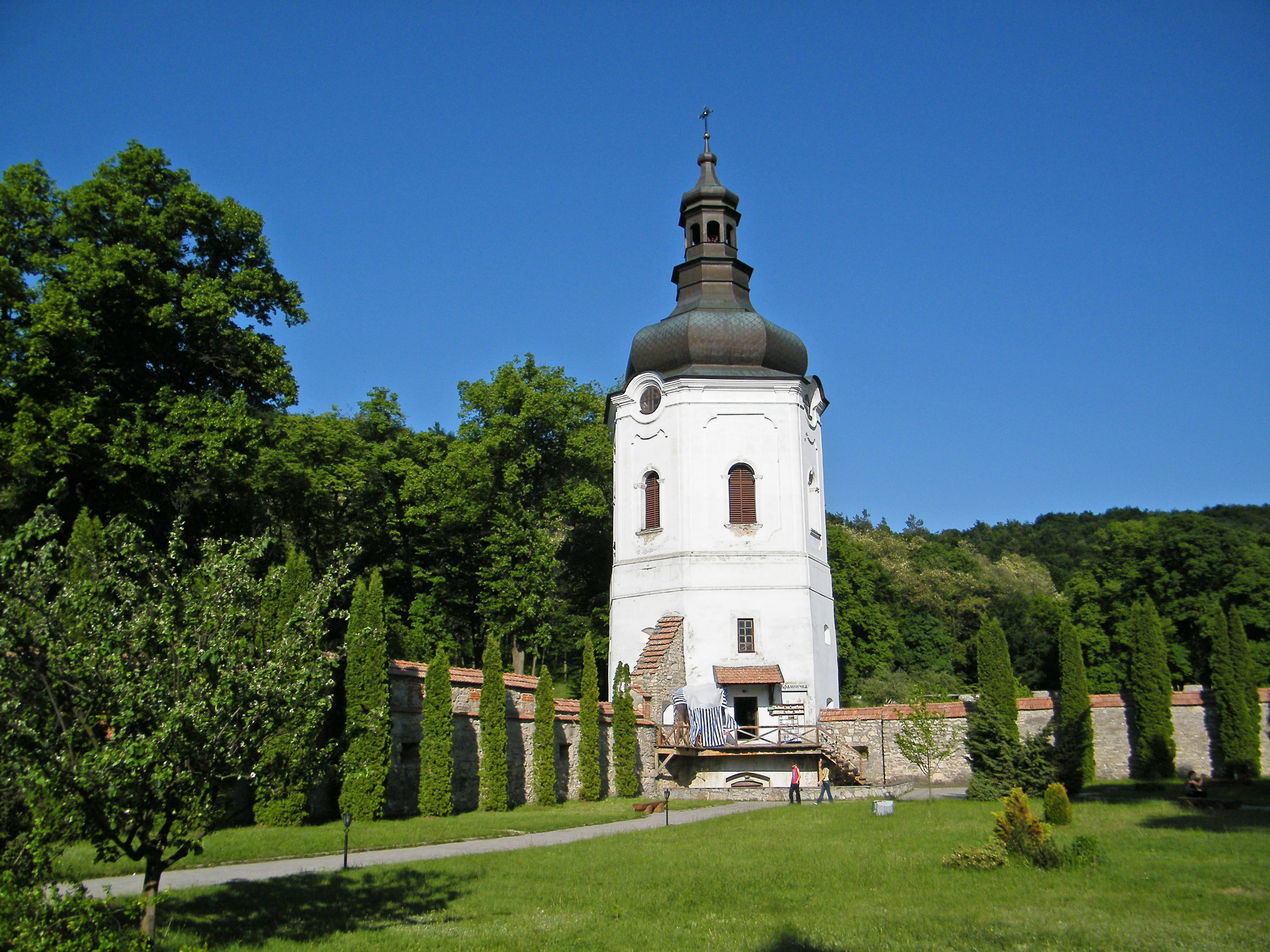 Четырехъярусная башня-колокольня